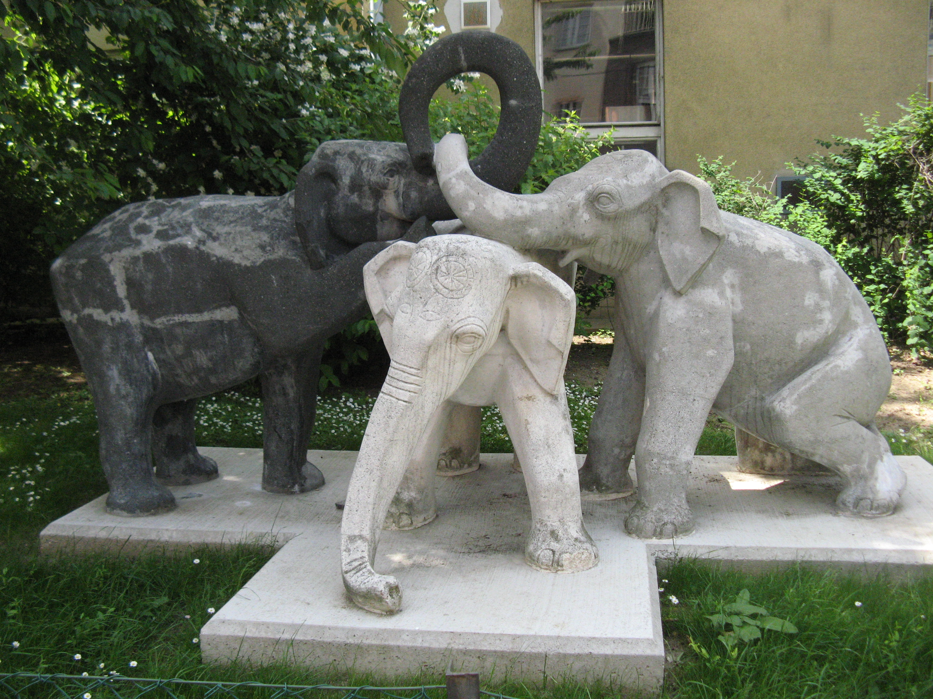 Elefanten (1964) von Ilse Pompe, Kindergarten, Quaringasse 13, Wien-Favoriten